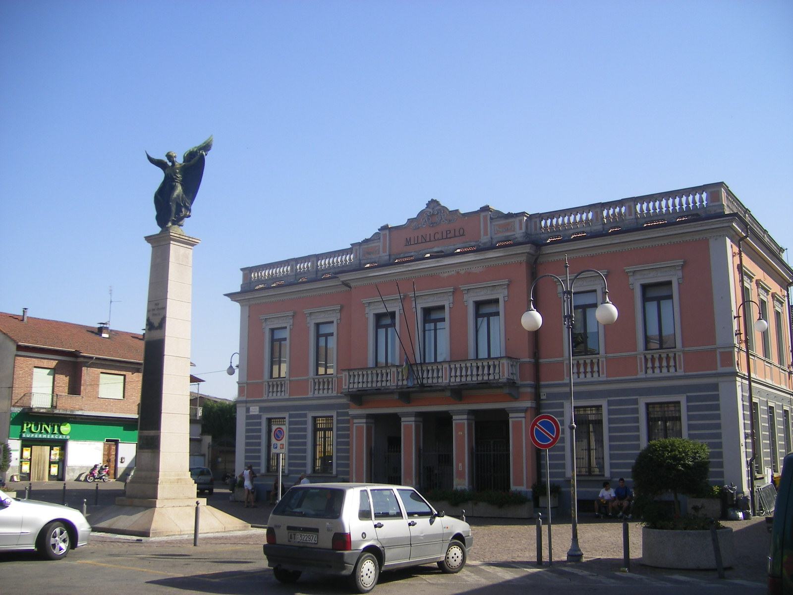 Castello di Annone - Town hall